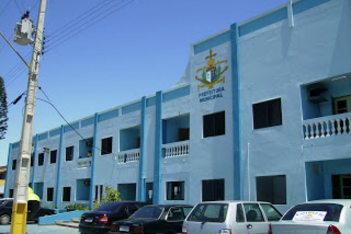 Prefeitura Municipal da cidade de Ilha Comprida-SP